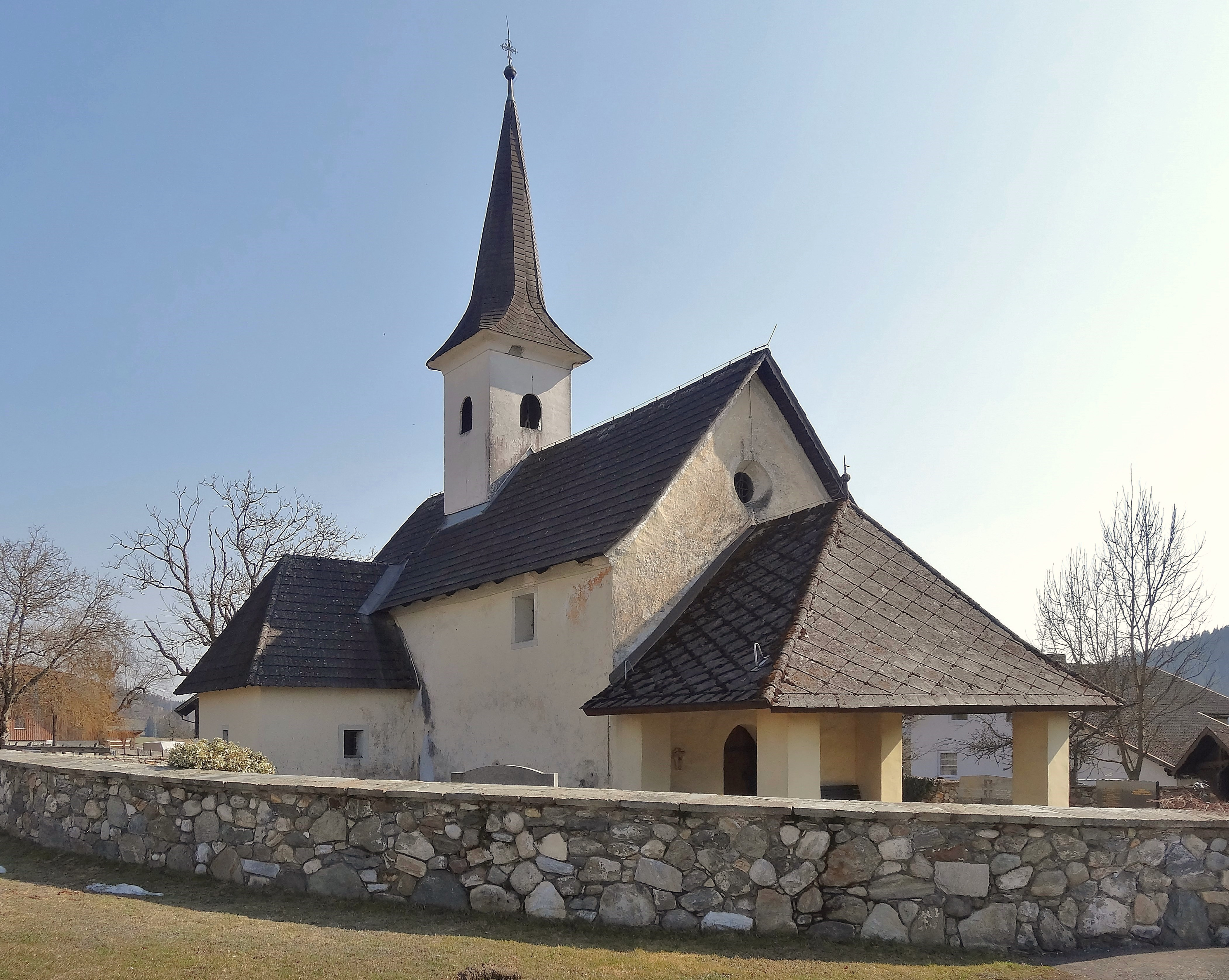 Kath. Filialkirche Heilige Andreas und Nikolaus in Knasweg (Moosburg)